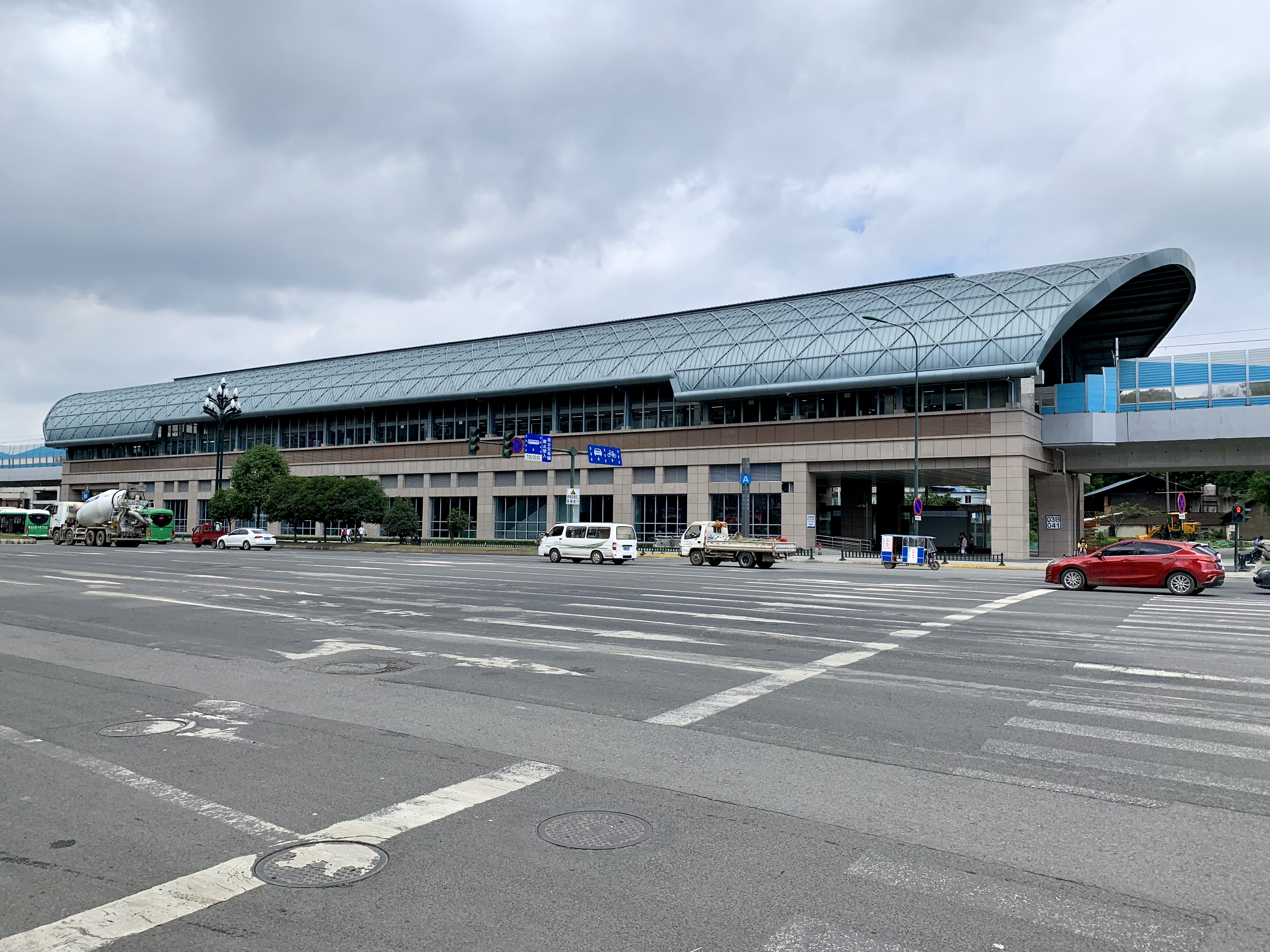 成都地铁植物园站